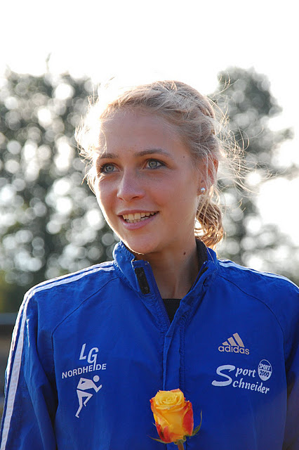 Jana Sussmann